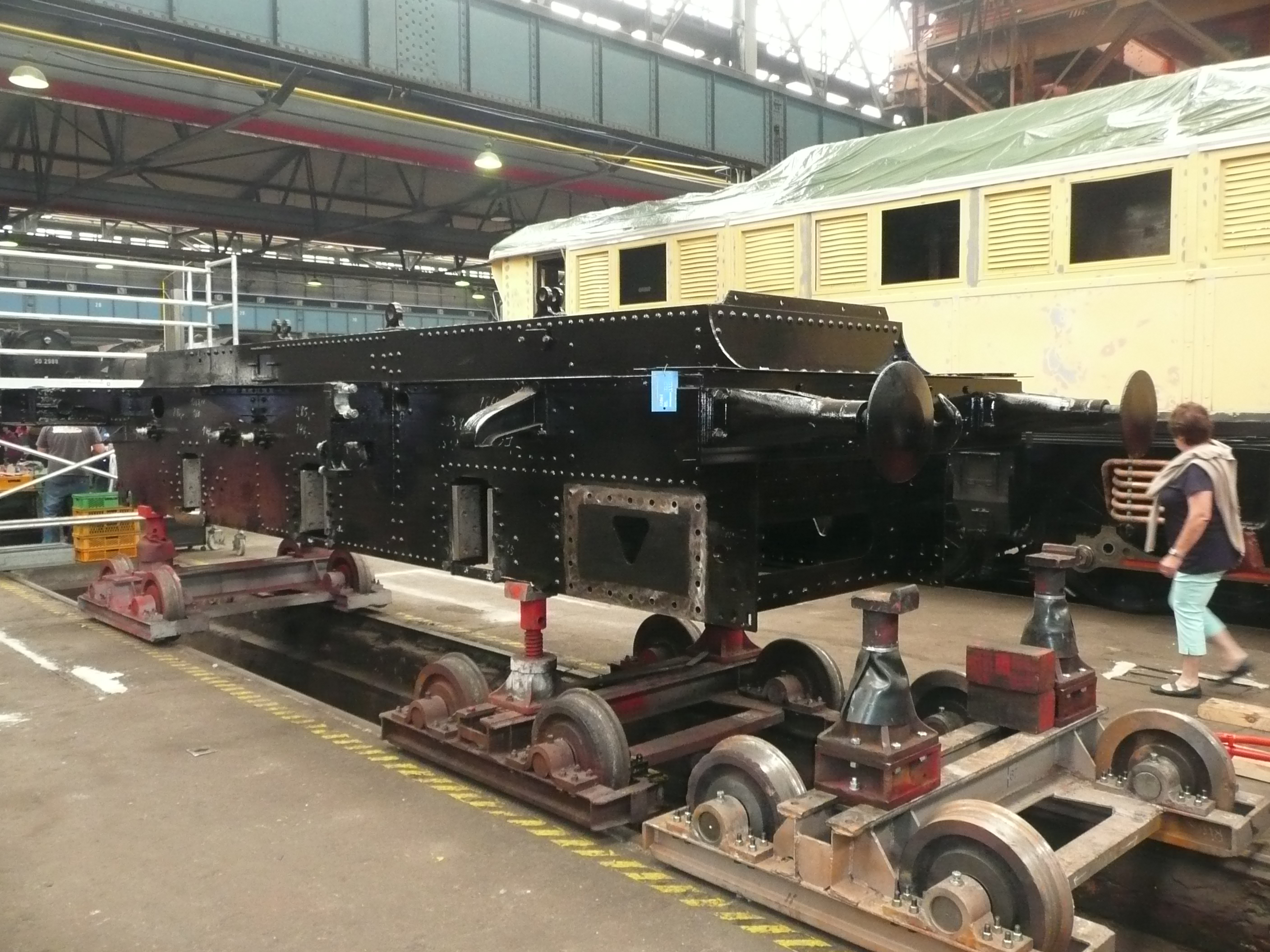 Rahmen der SBB E 3/3 8485 2014 im Werk Meiningen